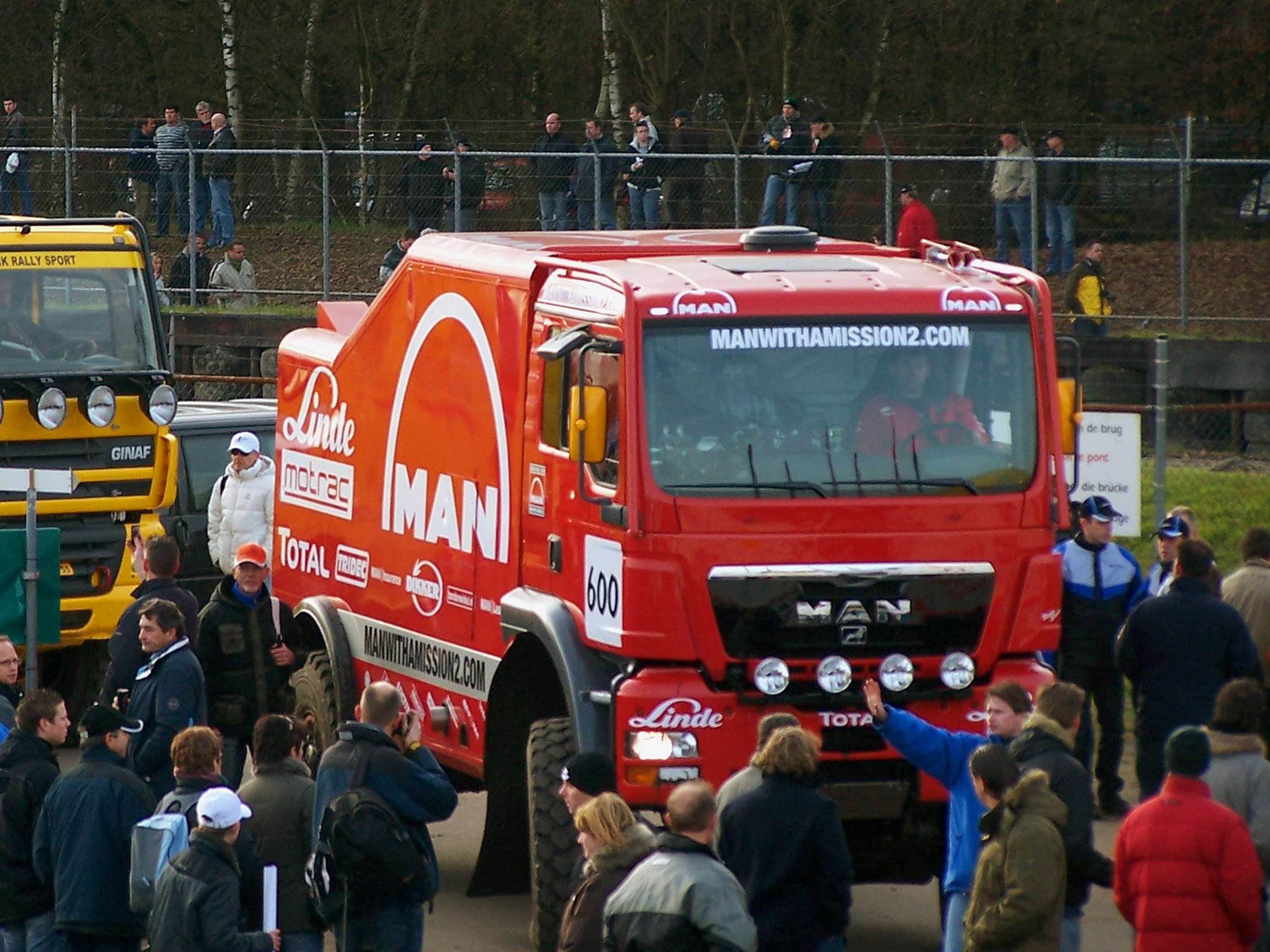 MAN GTS Supertruck 1 driven by Hans Stacey in the Dakar 2008.